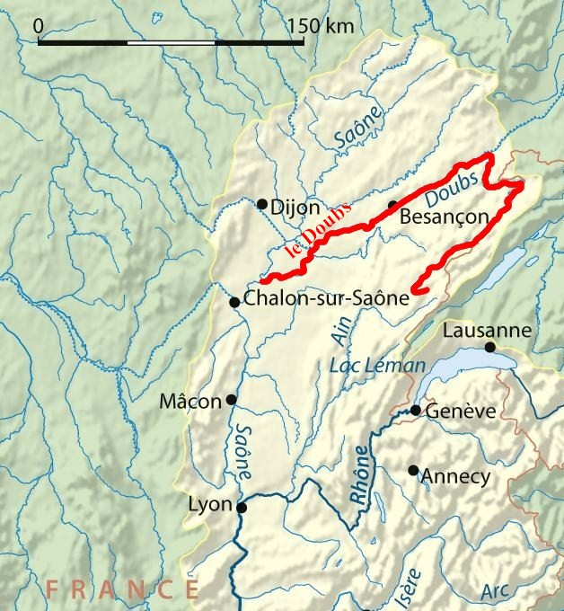 surlignage du tracé de la rivière Doubs (affluent de la Saône) - France